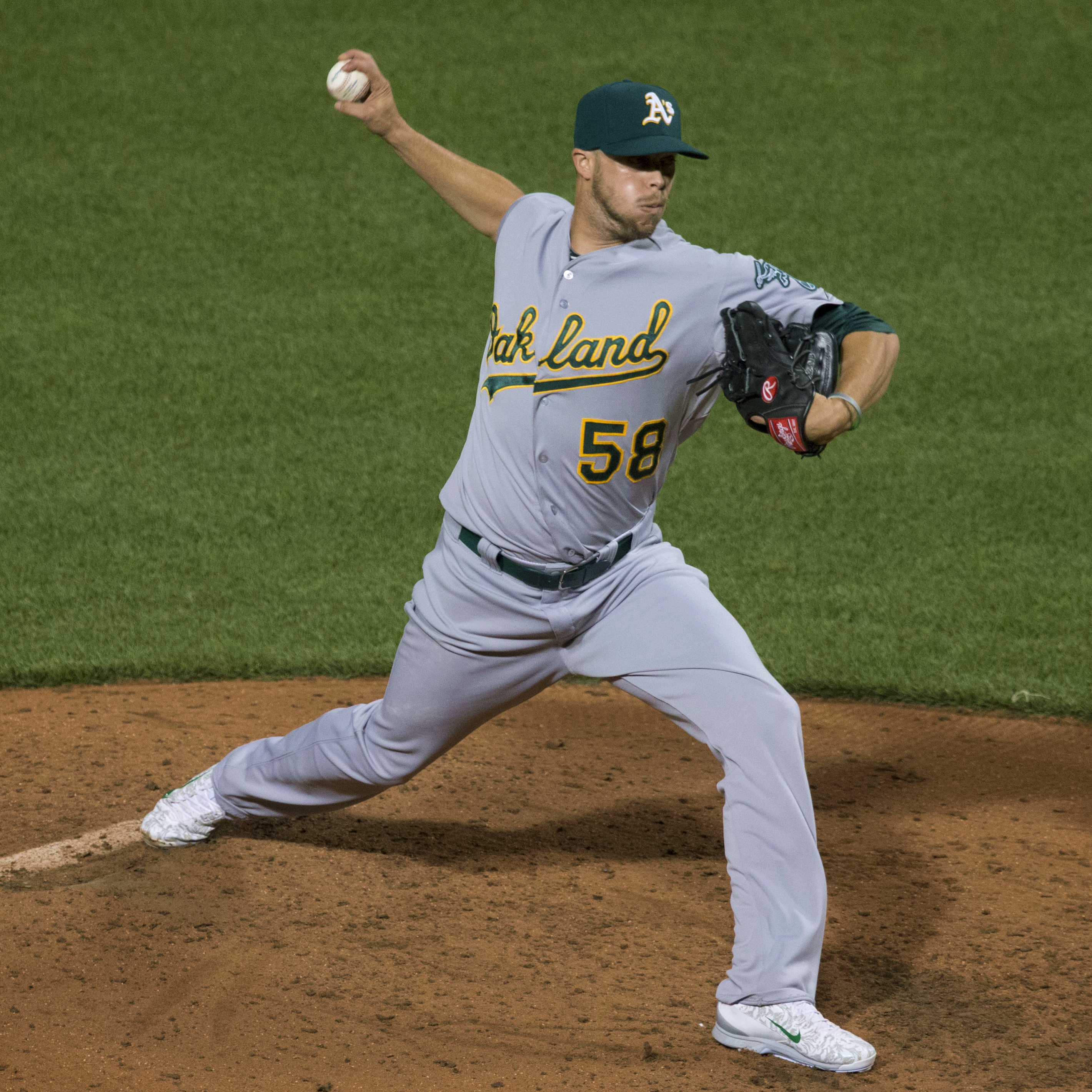 Evan Scribner